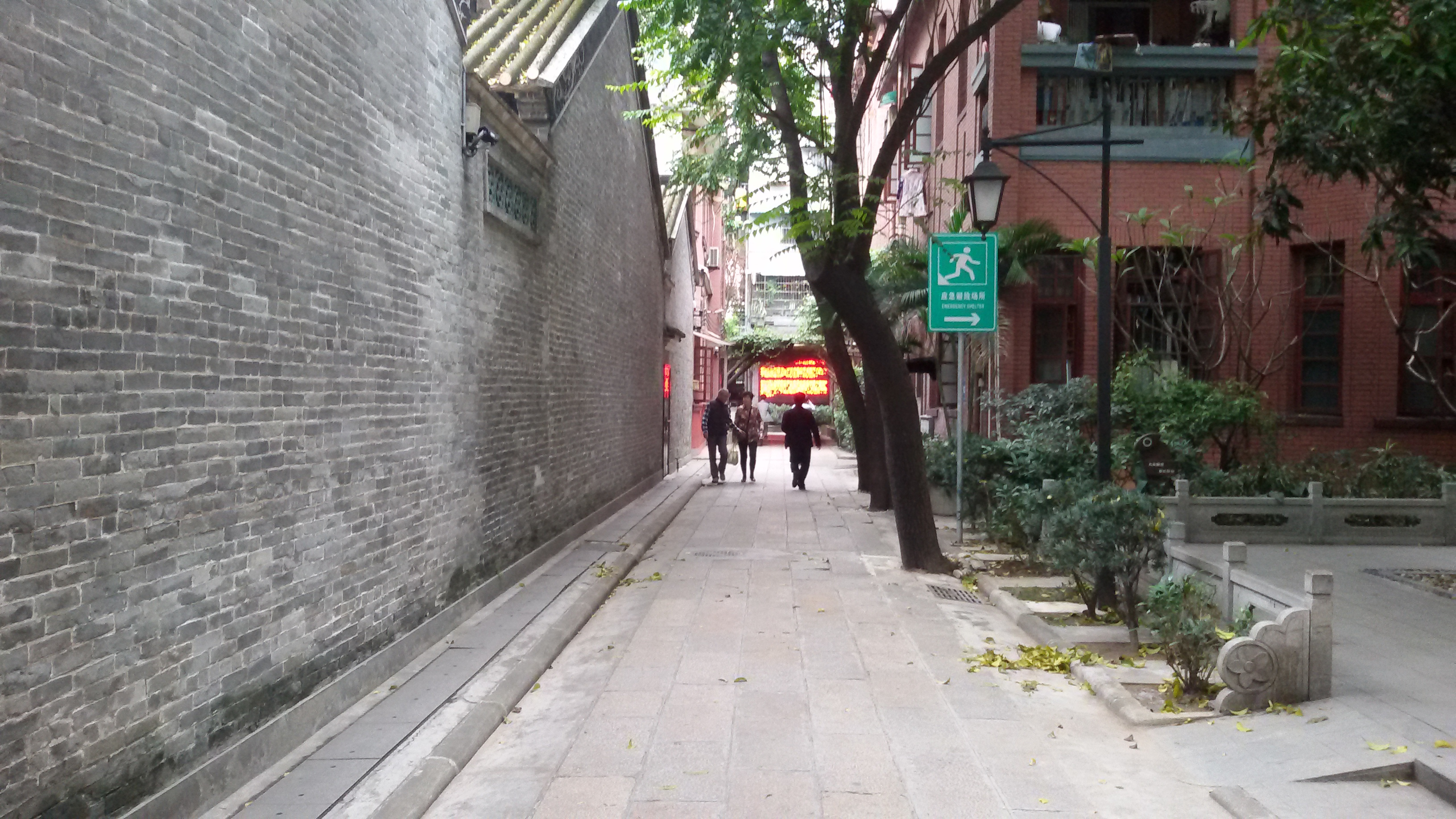 粵語: 小東營